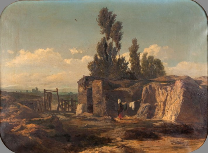 José Giménez Fernández (1846-1873): precoz pintor madrileño con una prometedora carrera de paisajista, muerto a los 27 años, uno de los más atentos a las enseñanzas de Haes. Tuvo un hermano mayor, Federico, también pintor. El Museo del Prado recibió un importante legado familiar a finales del siglo XIX.